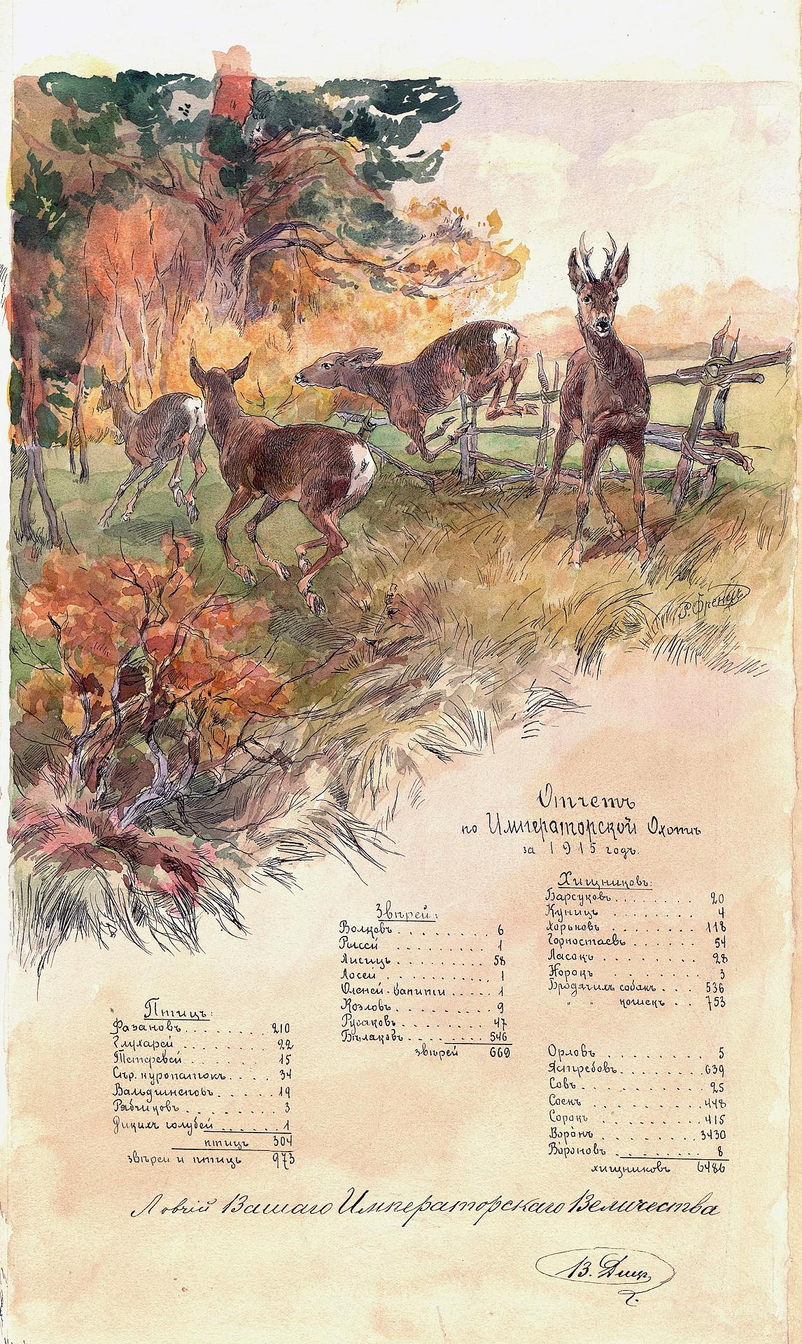 Отчет об императорской охоте. Бумага, картон, графитный карандаш, акварель, тушь